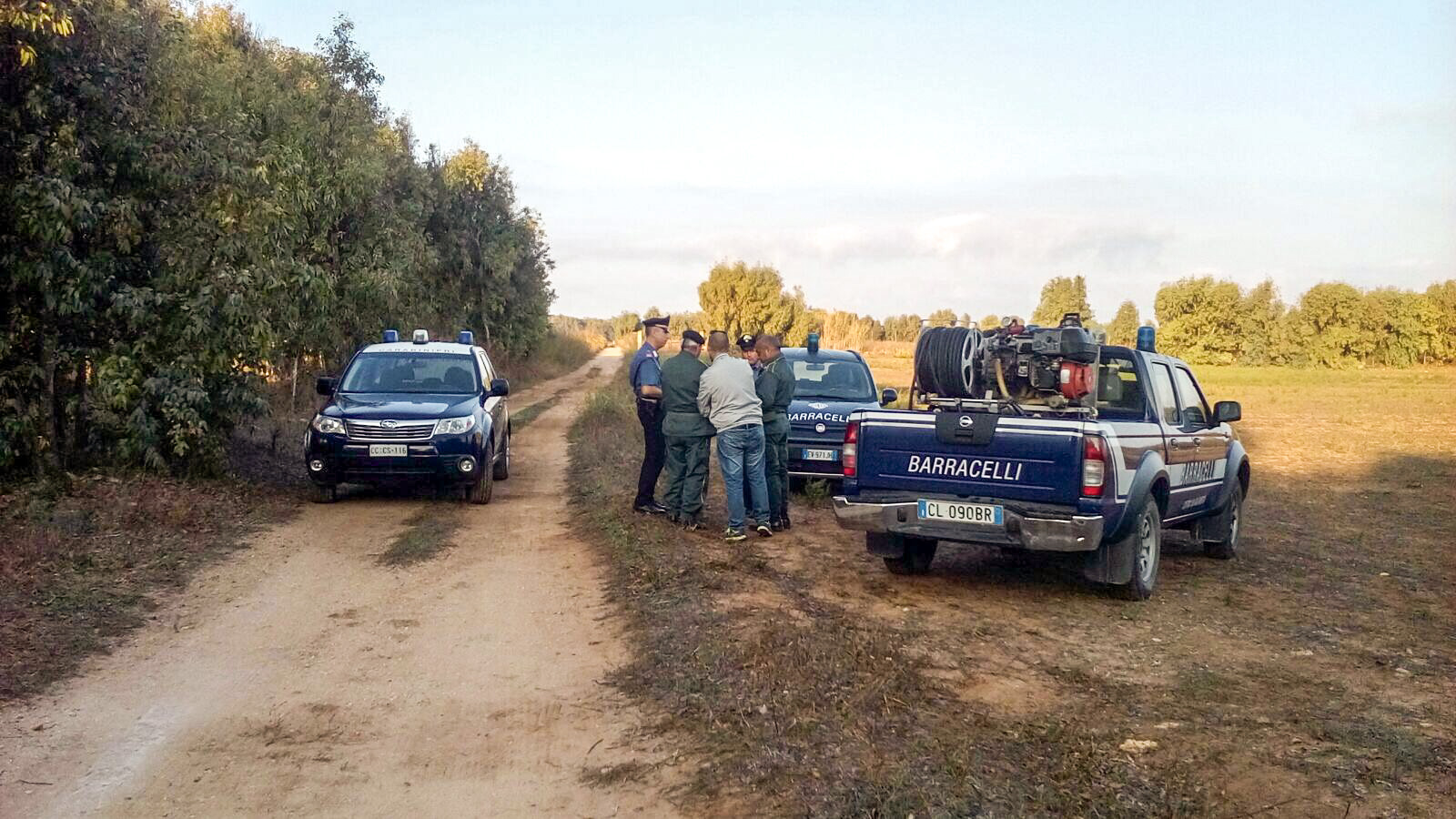 Controllo territorio con i Carabinieri